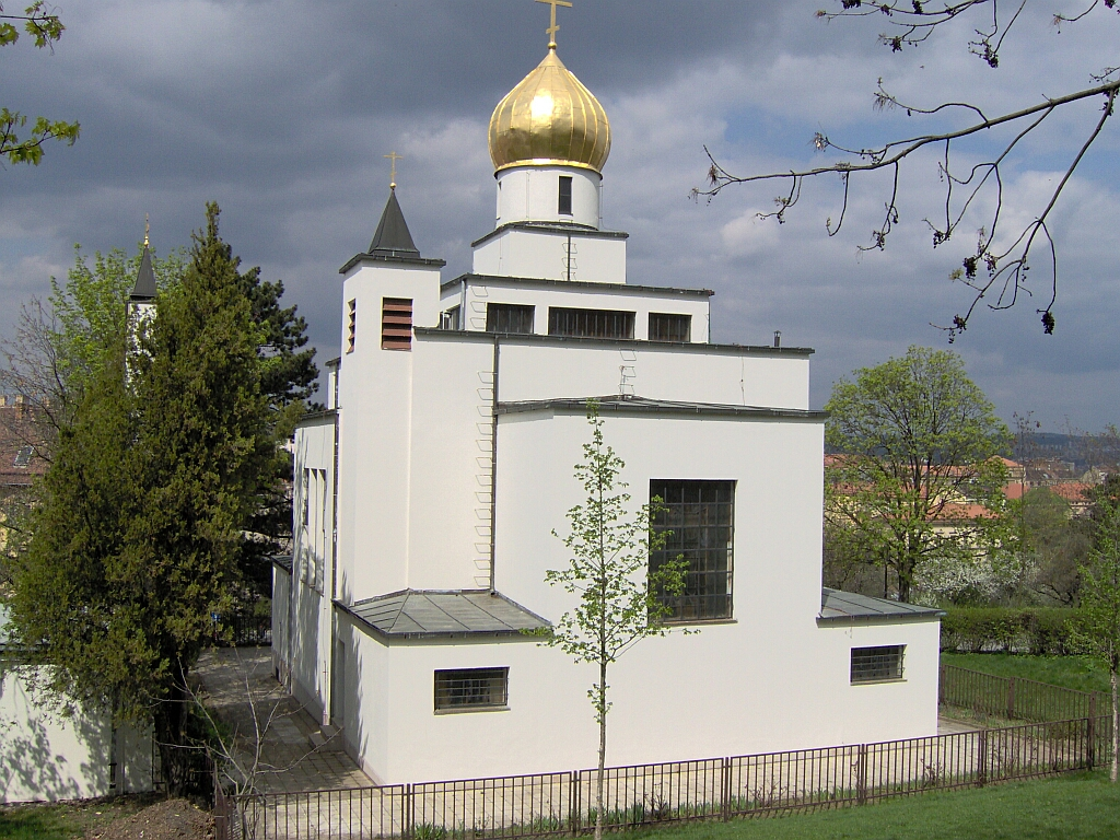 Další foto pravoslavného kostela Sv. Václava v Brně